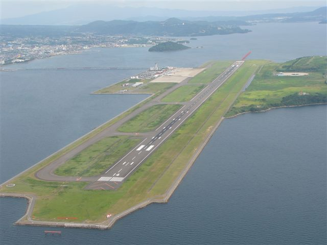 世界初の海上空港